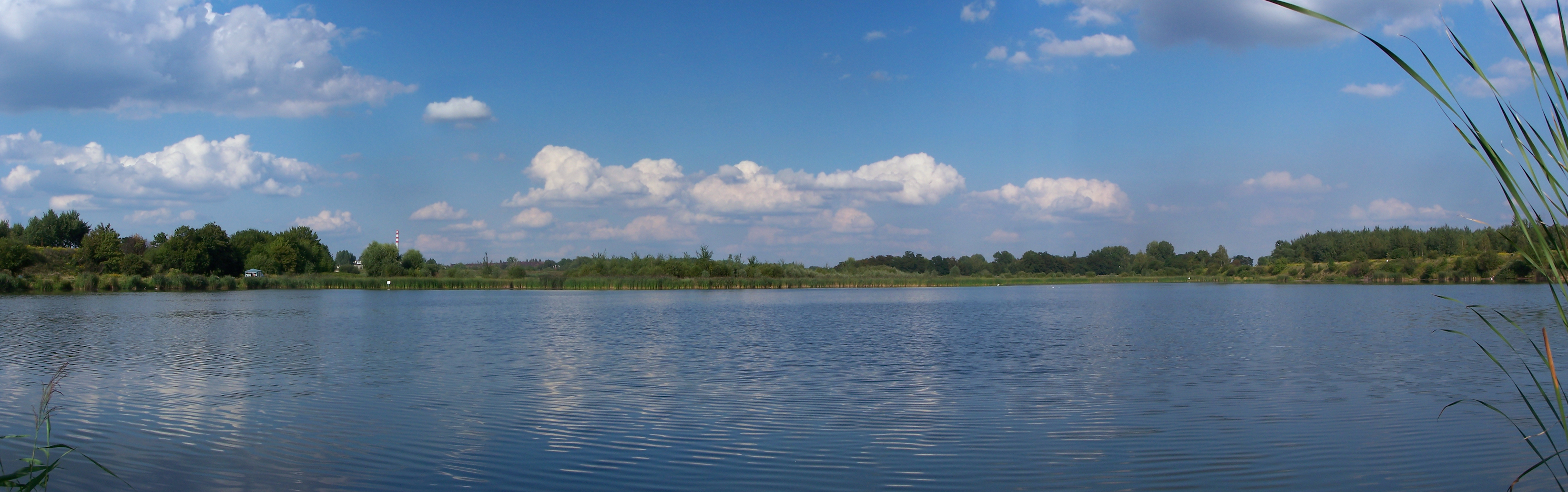 Zespół przyrodniczo-krajobrazowy "Żabie Doły" w Bytomiu.